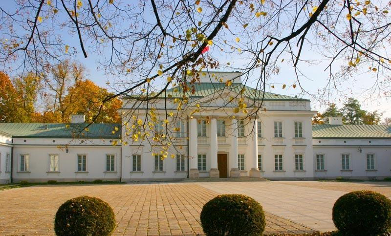 Warszawa (Polska)